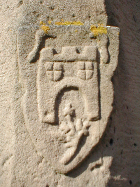 Altes Wappen von Stockheim (Stadtteil von Brackenheim) an einem Kruzifix von 1470